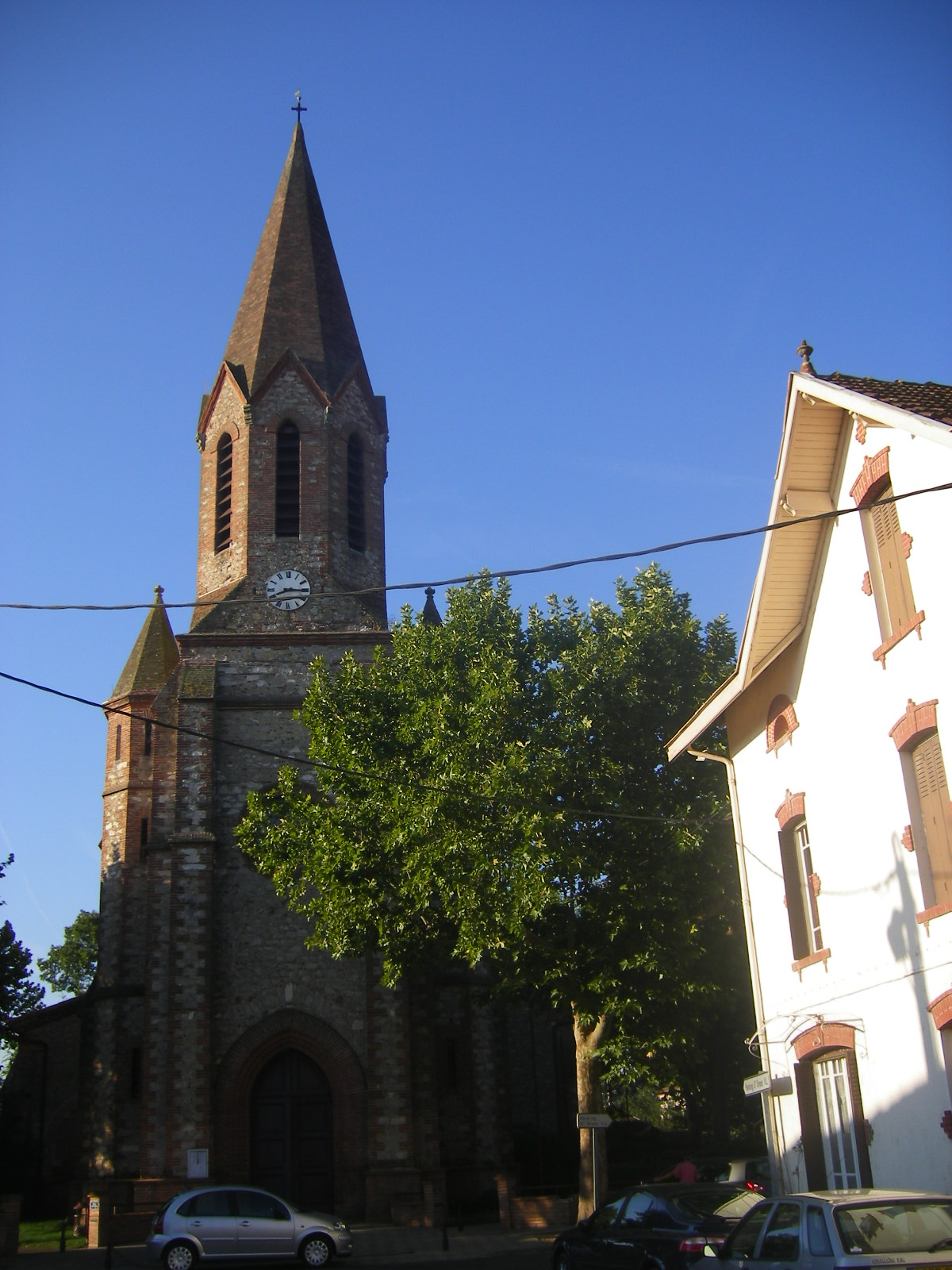 Marssac-sur-Tarn (Tarn) - église